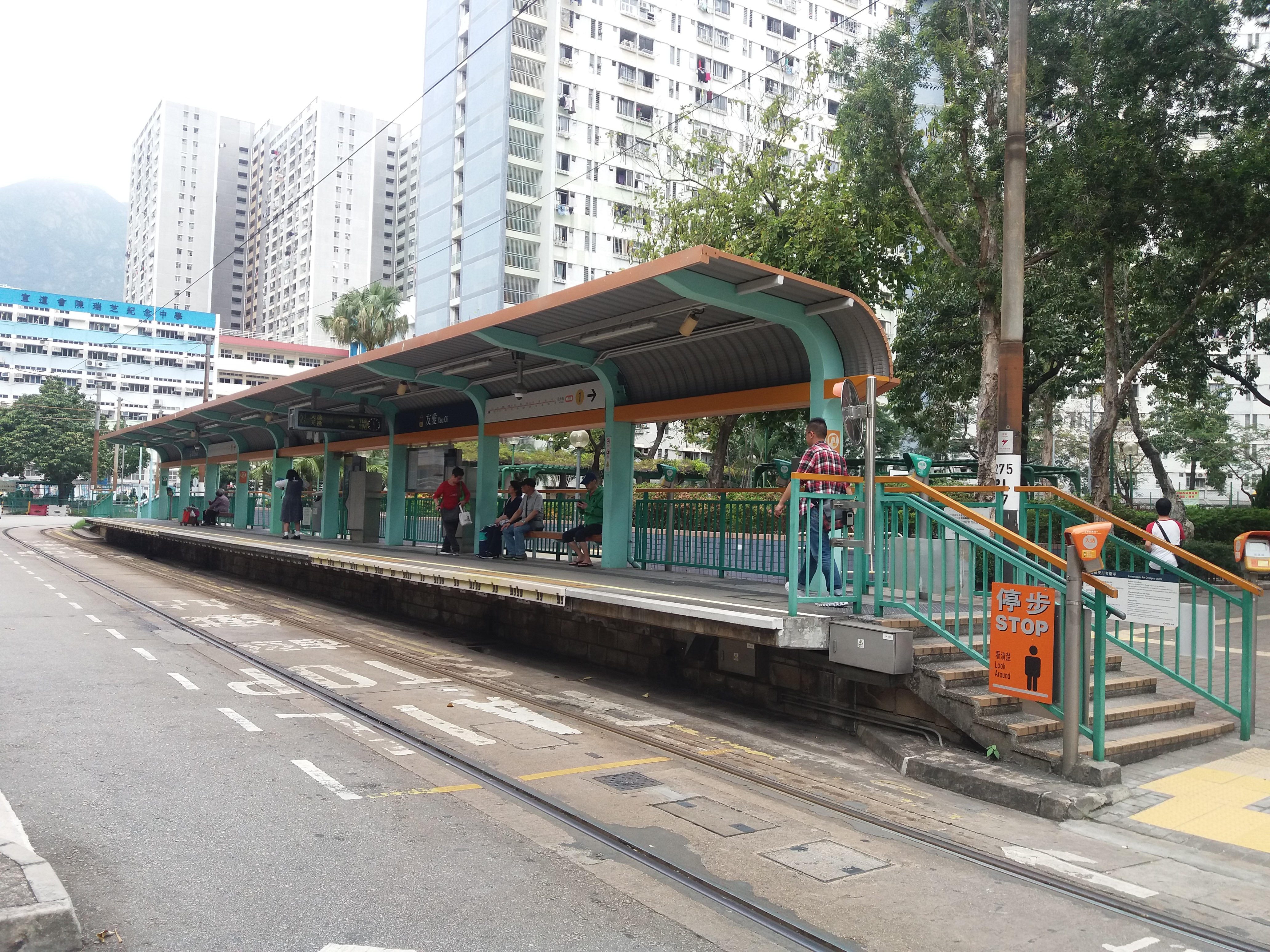 中文（香港）: 友愛站（2019年）